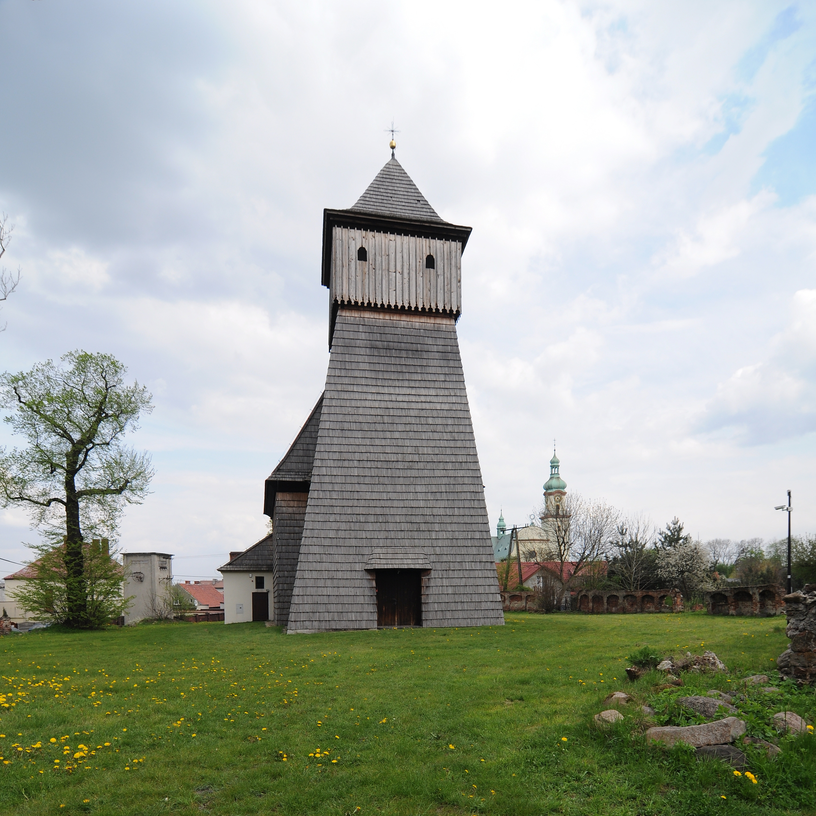 Gliwice, Kościół filialny pw. świętego Jerzego, z XVII wieku, drewniany z murowanym prezbiterium. Granice ochrony rozciągają się na całość budowli wraz z wystrojem wnętrza, w ramach ogrodzenia.